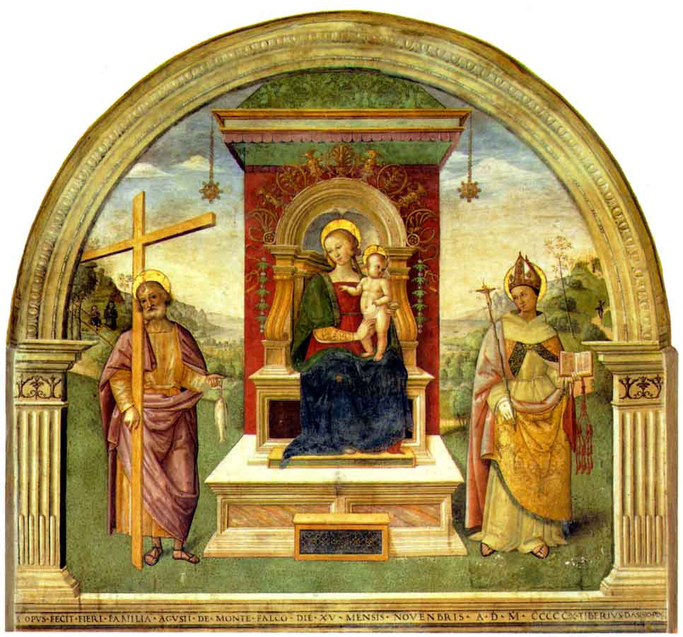 Madonna col Bambino e i santi Pietro e Bonaventura, affresco, Museo civico, Montefalco, Italy